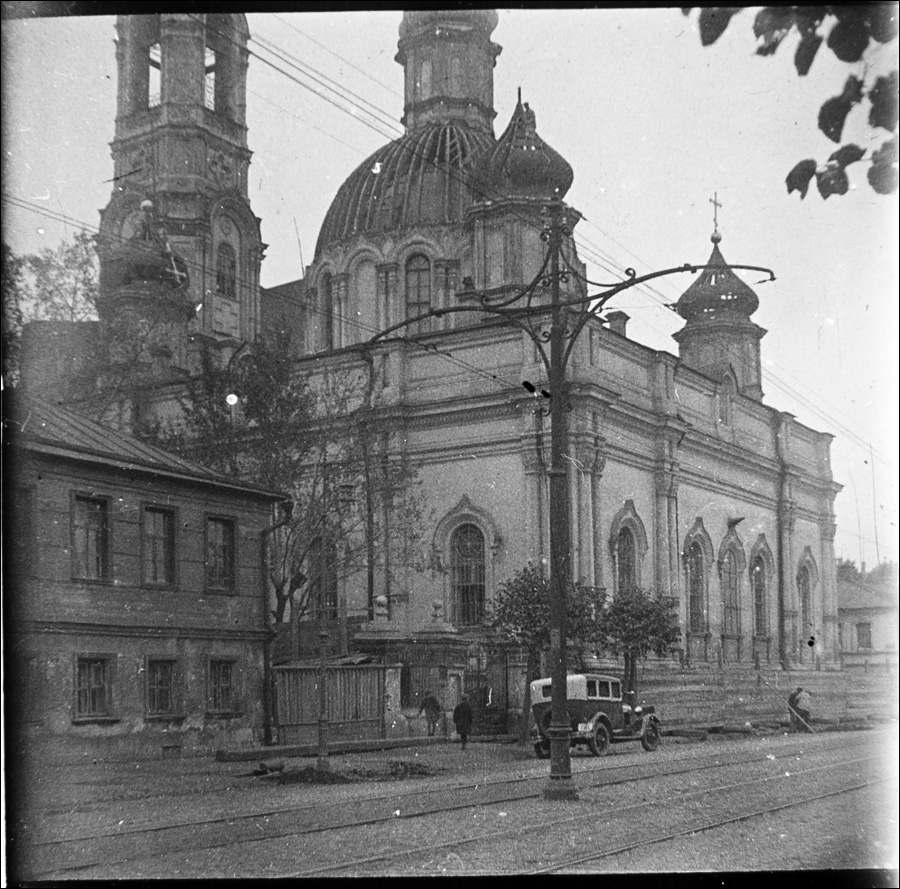 Церковь изображена во время сноса в 1936 году. Оцифровано со стеклянного диапозитива.